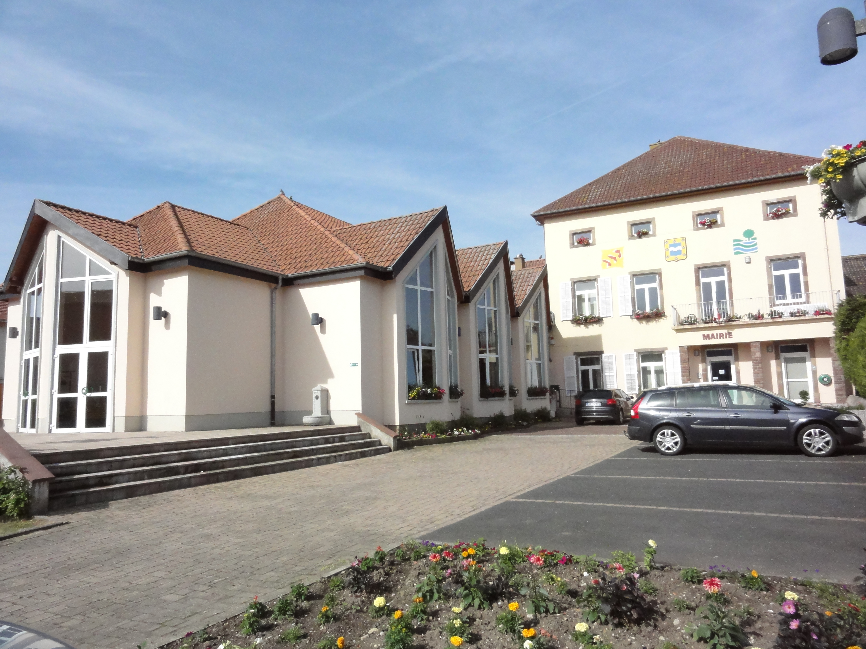 Langatte (Moselle) mairie